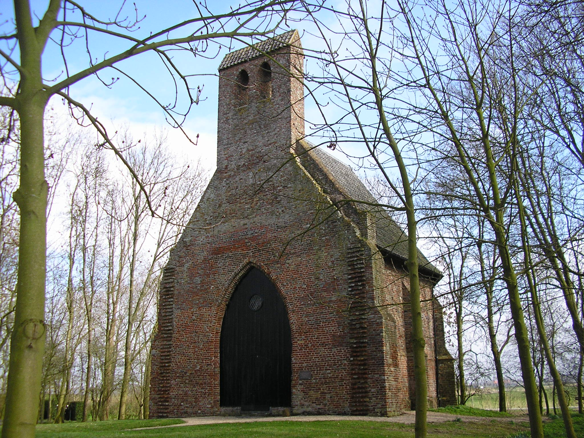 Kapel (Hoogelande)